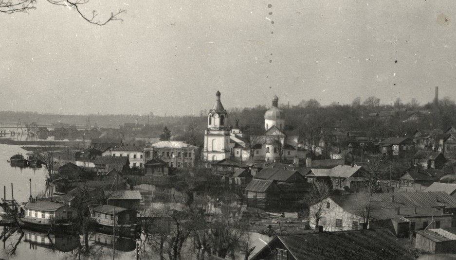 Беларуская (тарашкевіца): Магілёў (Mahiloŭ), утока Дубравенкі (Dubravienka) ў Дняпро (Dniapro)